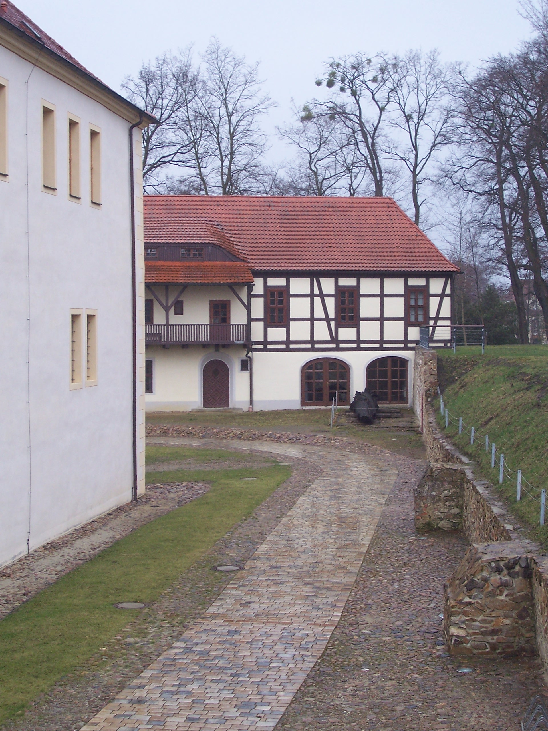 Innenhof des Senftenberger Schloss Blick auf das Kommandantenhaus.